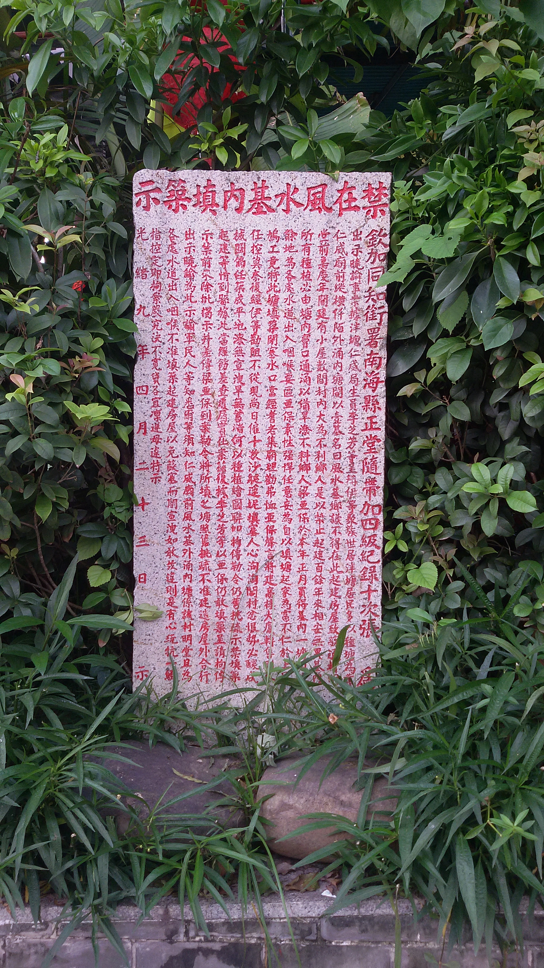 粵語: 風水基石碑